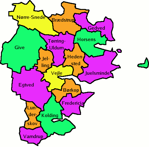 Kort over Vejle Amt.